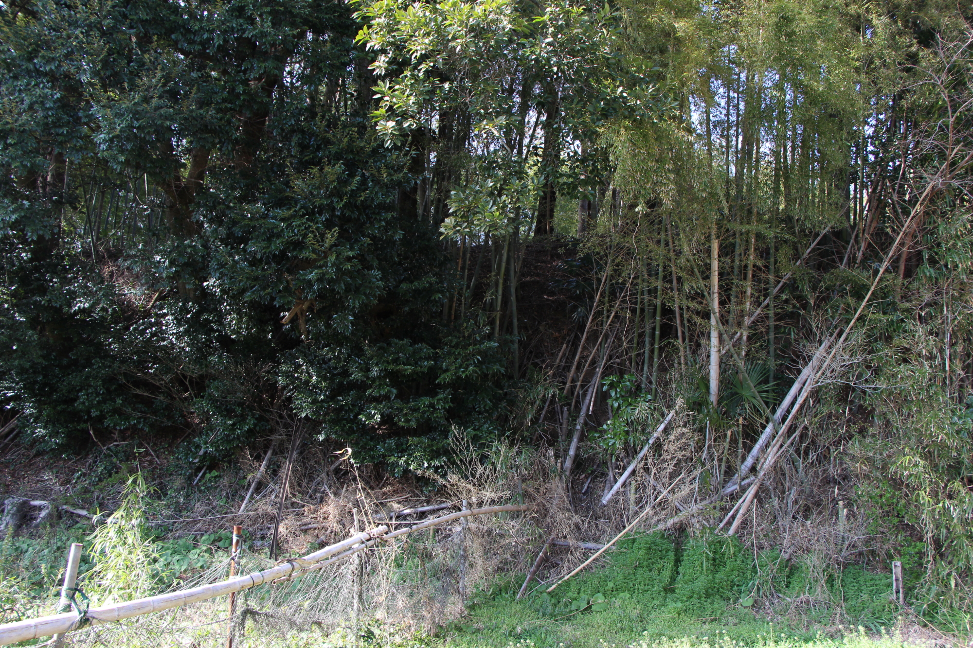 一の堀から主郭の崖を臨む